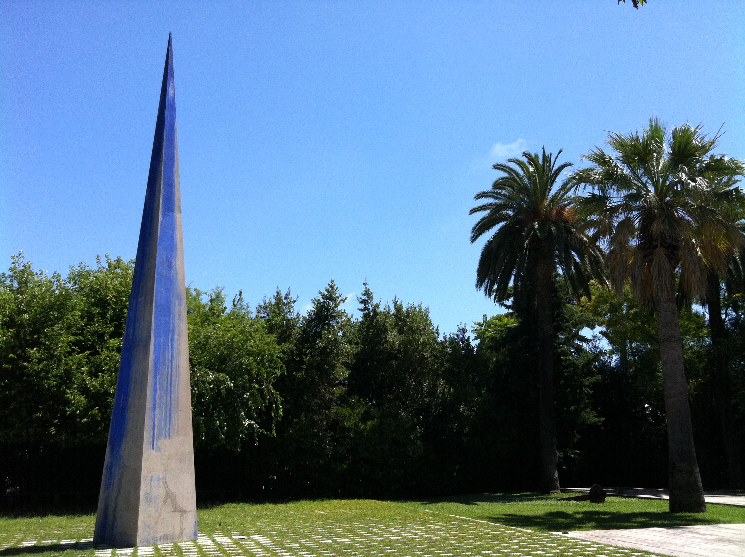 Jardí de les Escultures de Barcelona